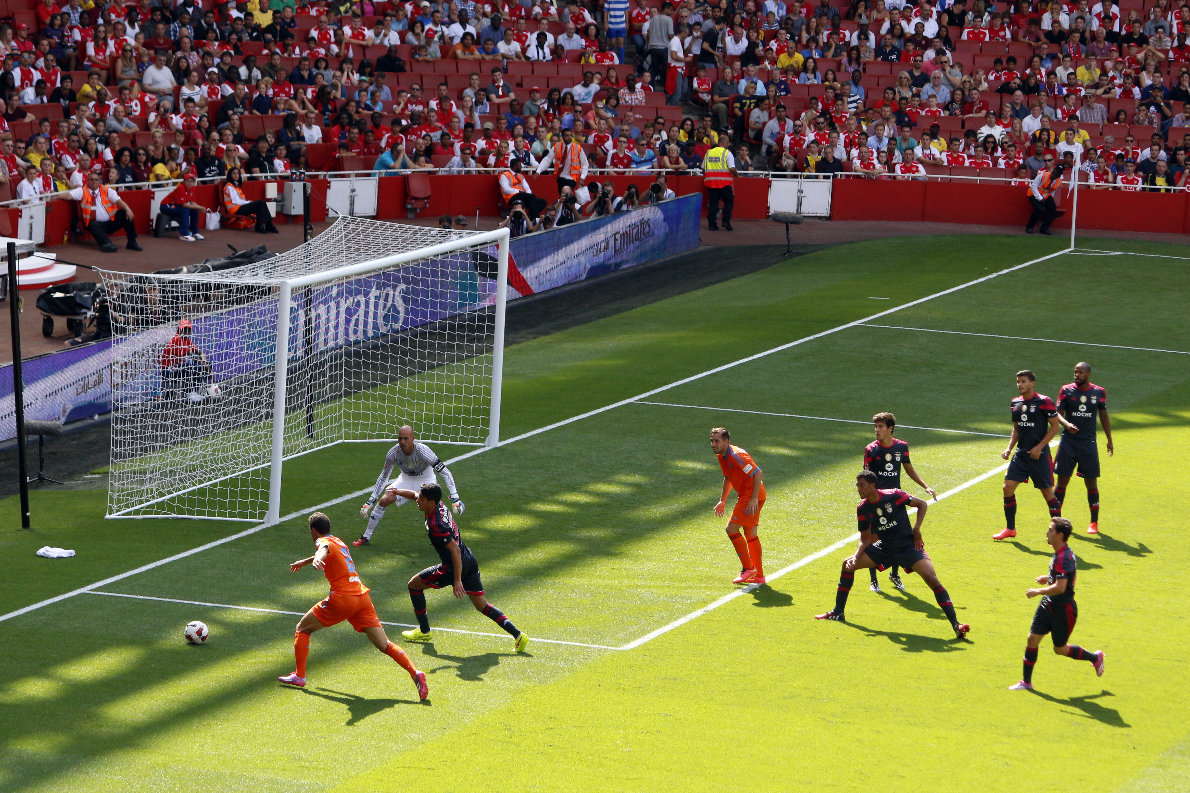 Emirates Cup, 3 d'agost de 2014.